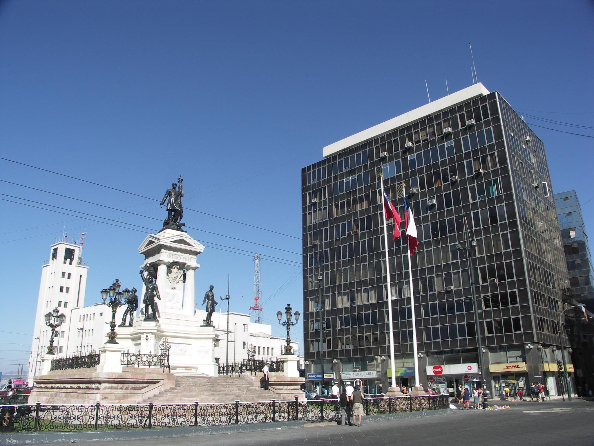 Valparaíso, Chile